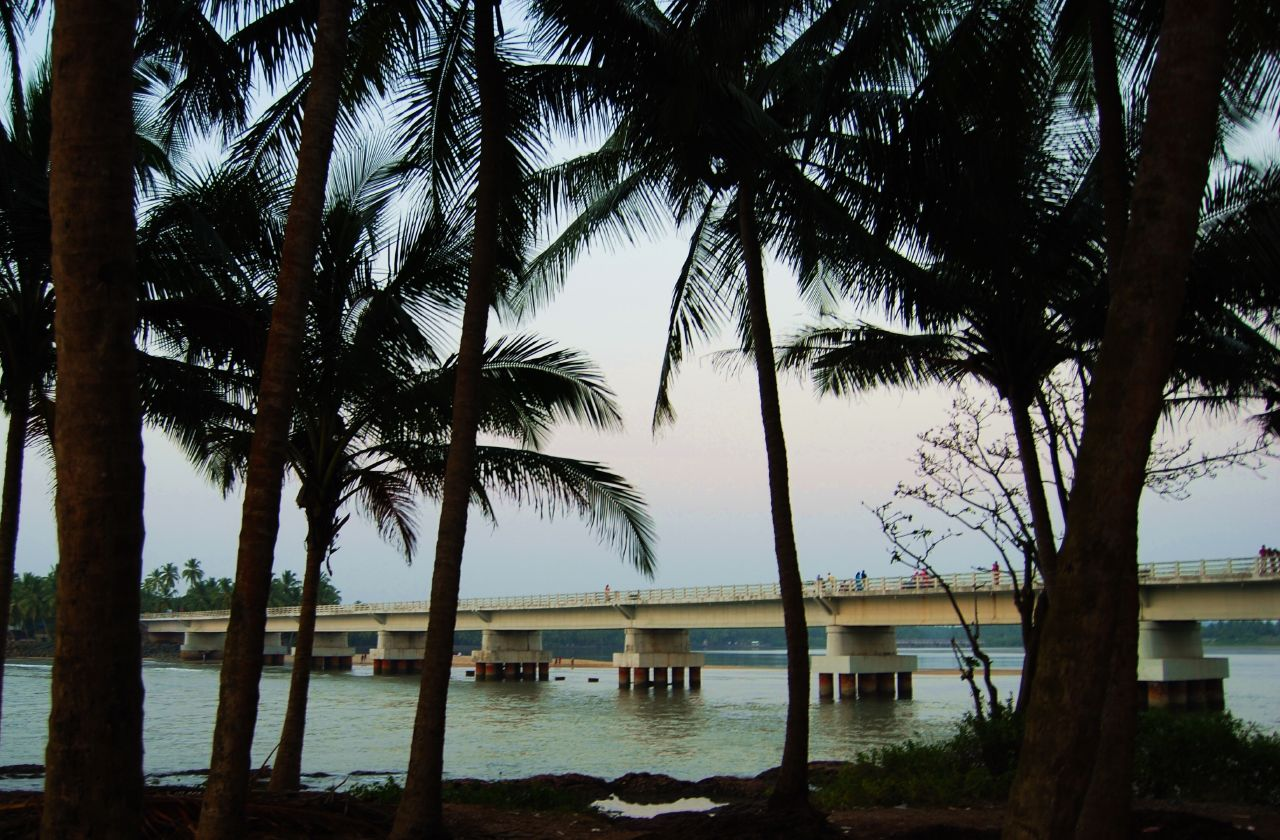 Kadalundi Bridge.